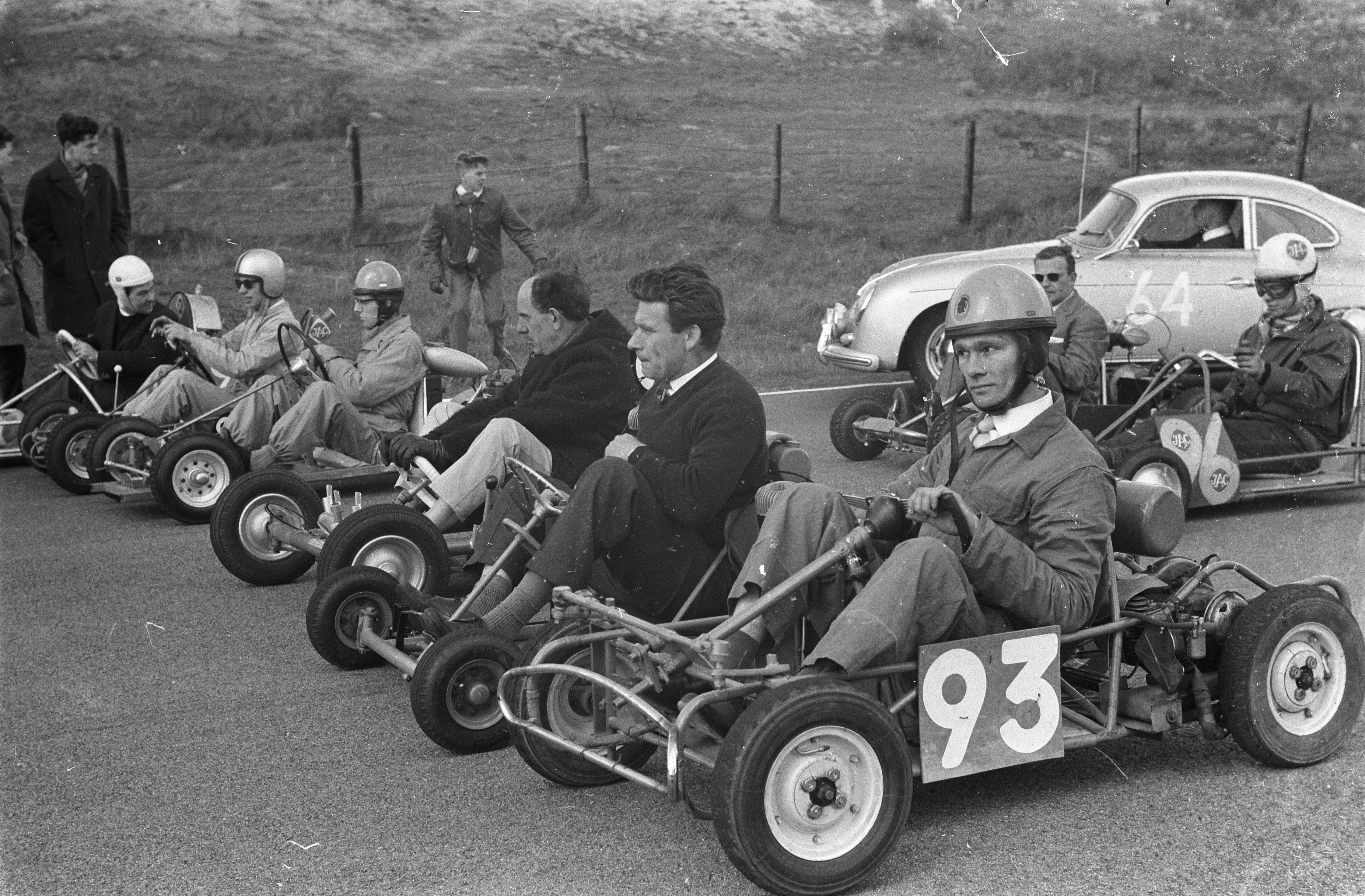 Collectie / Archief : Fotocollectie Anefo Reportage / Serie : [ onbekend ] Beschrijving : Voor de eerste maal in Nederland skelterraces op het circuit van Zandvoort Datum : 18 april 1960 Locatie : Noord-Holland, Zandvoort Trefwoorden : circuits, skelterraces Fotograaf : Pot, Harry / Anefo Auteursrechthebbende : Nationaal Archief Materiaalsoort : Negatief (zwart/wit) Nummer archiefinventaris : bekijk toegang 2.24.01.05 Bestanddeelnummer : 911-1761